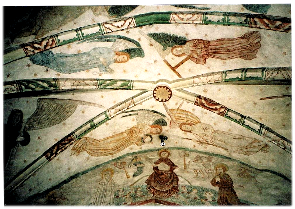 Gotische Wandmalereien im Chorraum: Engel mit Leidenswerkzeugen und Musikinstrumenten, Jüngstes Gericht.